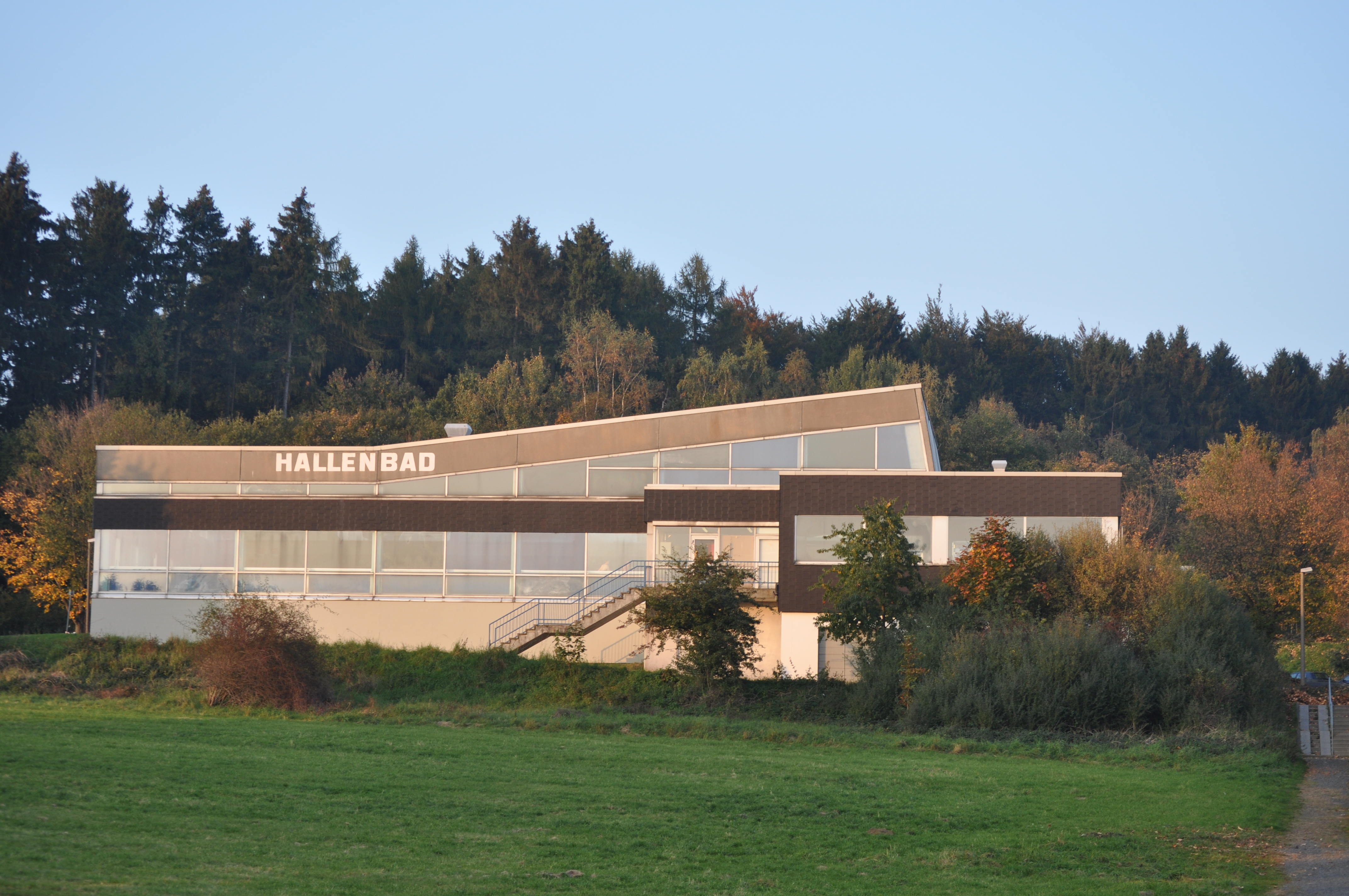 Hallenbad in Wirges